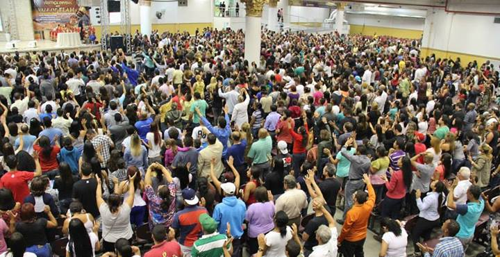 Facebook oficial, reunião 20/05/14. Sede Nacional, Av.Celso Garcia,899 no Brás.